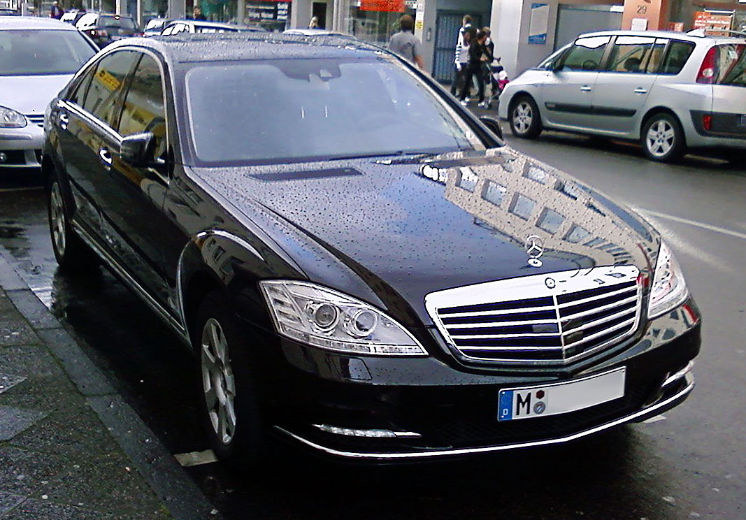 Mercedes-Benz W221 facelift 2009